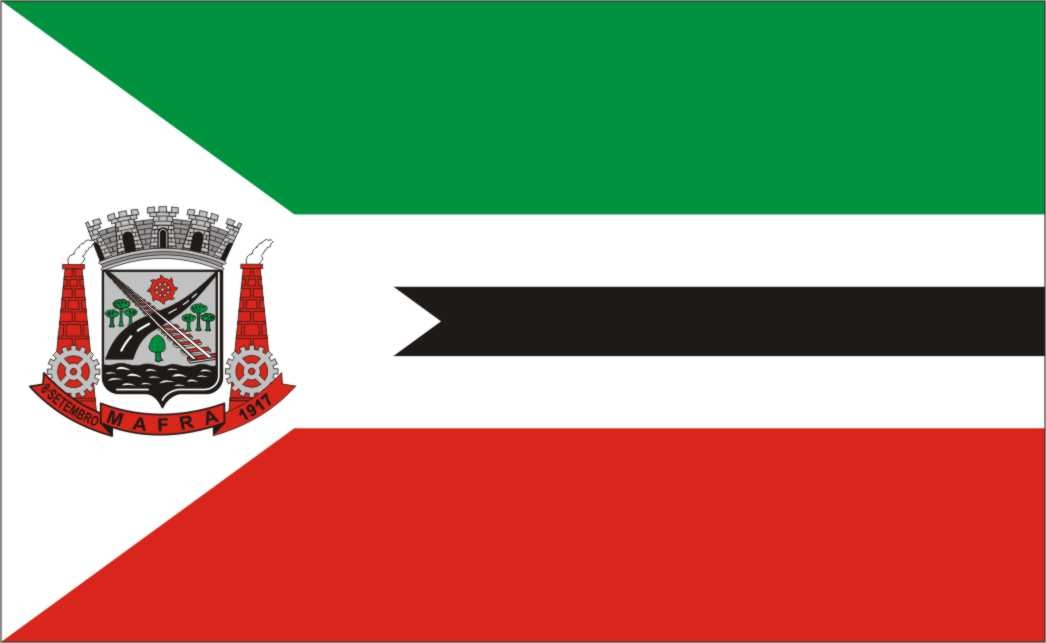 Drapeau de la municipalité de Mafra - SC - Brésil